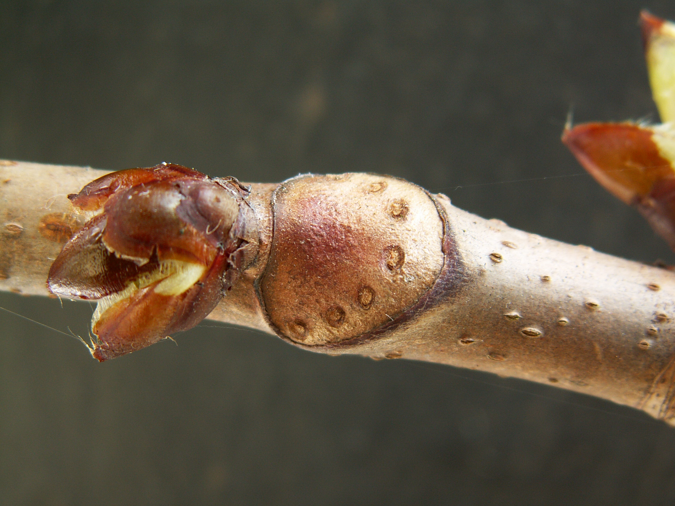 Aesculus hippocastanum